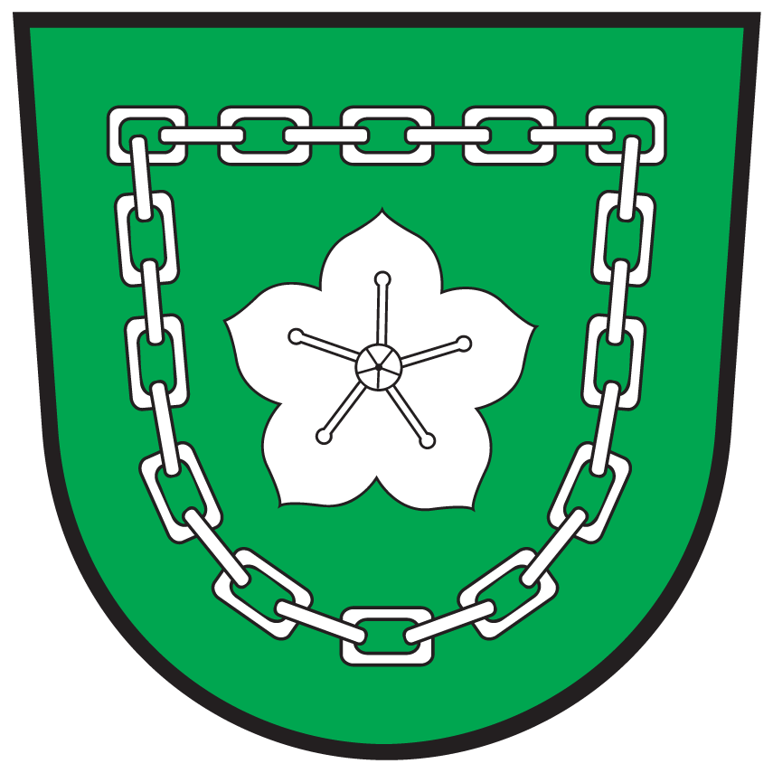 Wappen von Mörtschach